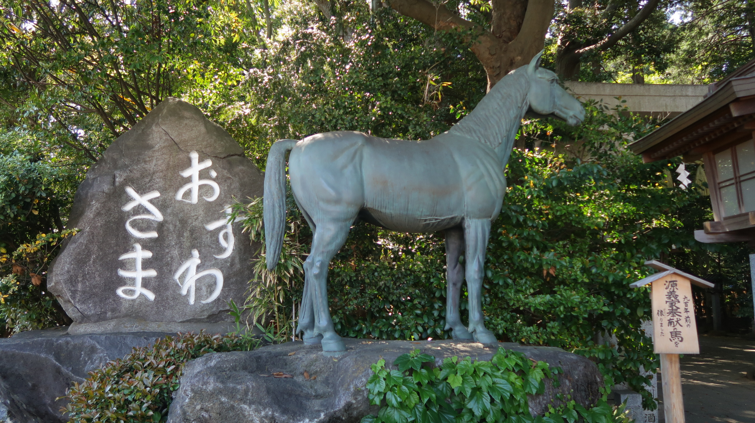 駒木諏訪神社（千葉県流山市駒木） Canon PowerShot G7 X Mark II